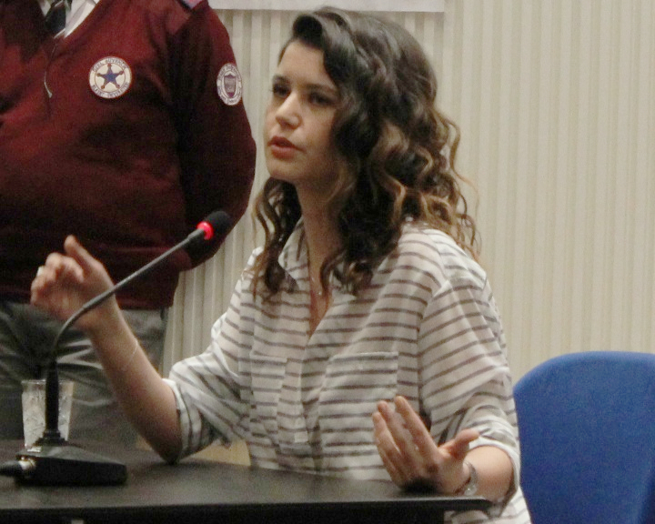 Beren Saat, Bilkent Üniversitesi'ndeki söyleşisinde.